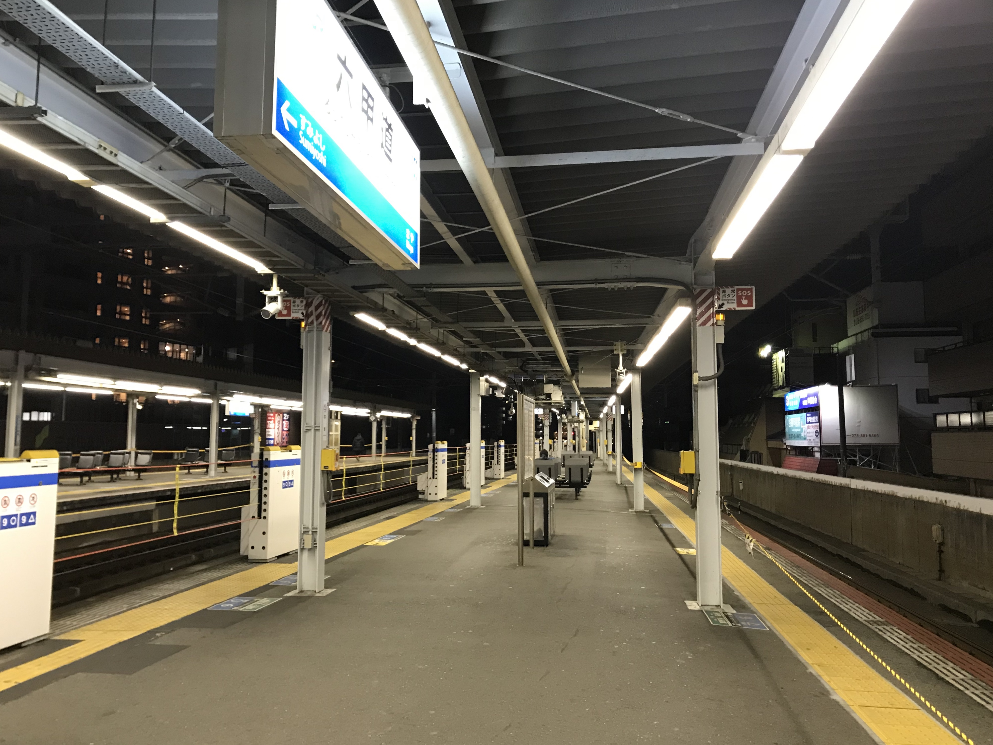 六甲道駅のホーム(奥は摩耶方面)